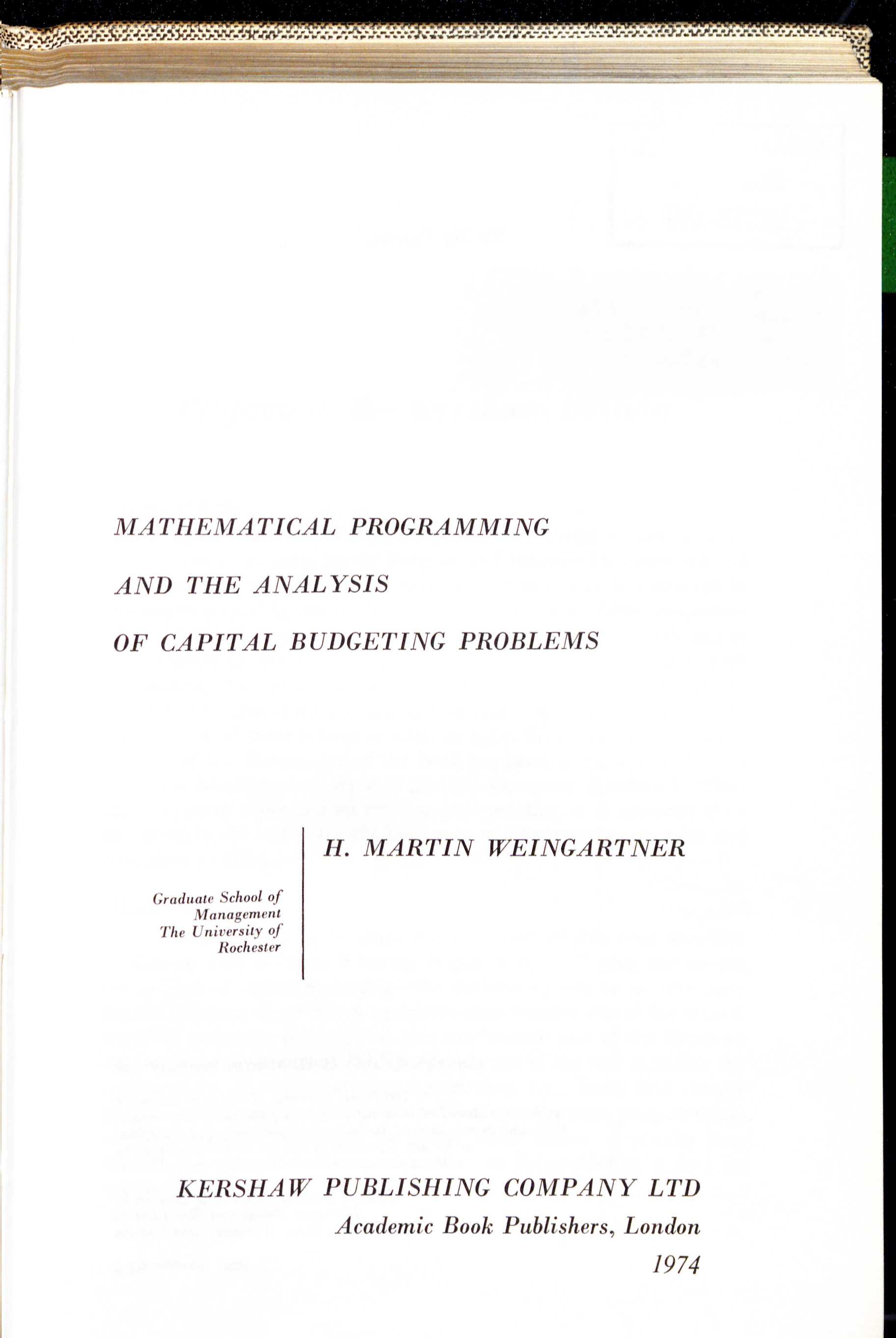 Hans Martin Weingartner Mathematical programming and the analysis of capital budgeting problems. Kershaw, London 1974, ISBN 0-901665-09-3 Invalid ISBN. (Dissertation 1963)